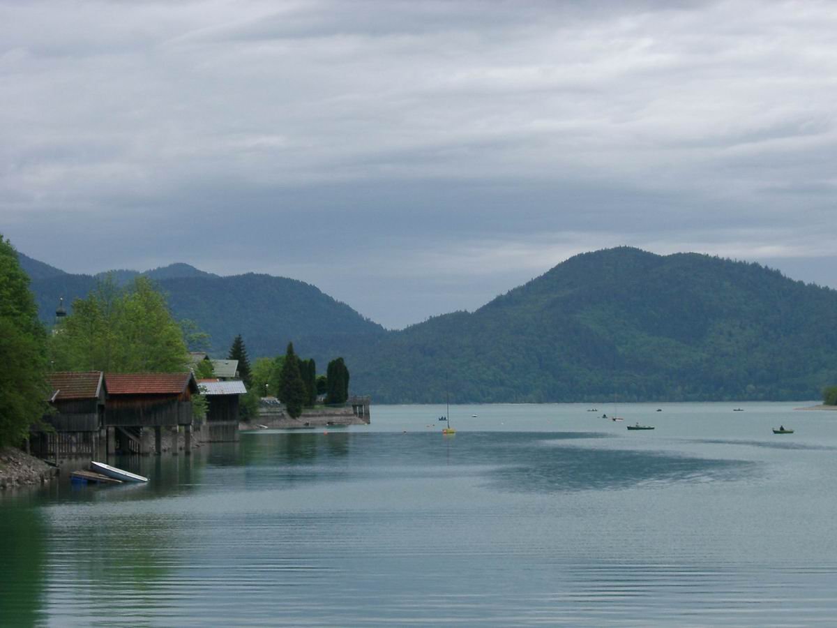 Walchensee